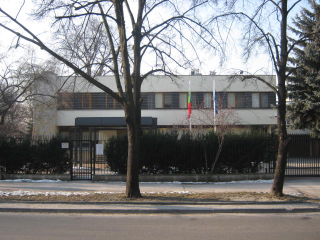 Ambasada Republiki Portugalskiej w Warszawie (ul. Ateńska 37, Saska Kępa)